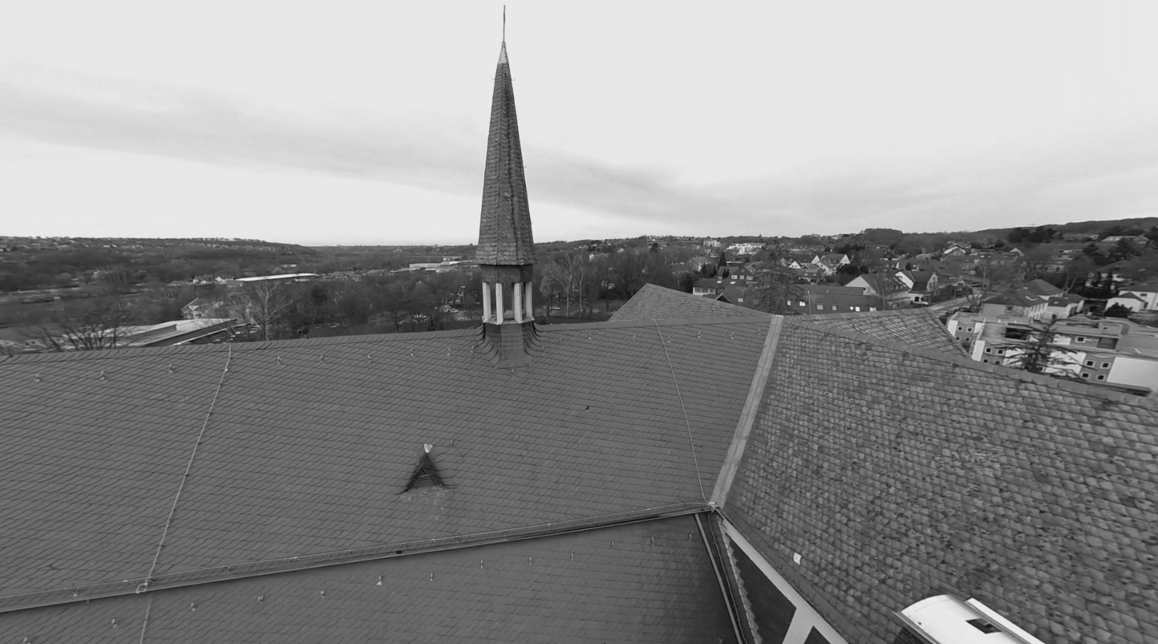 Der Dachreiter der ehemaligen Pfarrkirche St. Josef vor seinem Abriss